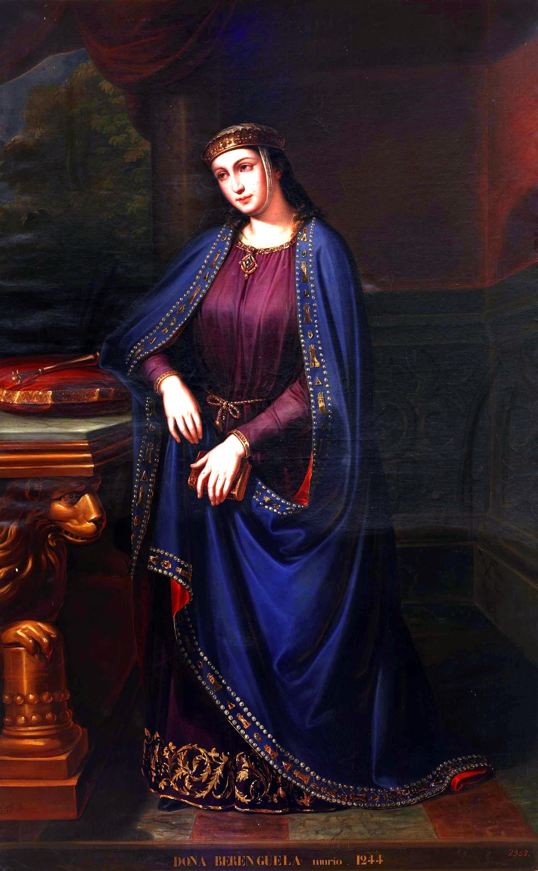 Retrato imaginario de la reina Berenguela de Castilla (c. 1179-1246). Fue hija del rey Alfonso VIII de Castilla y de la reina Leonor de Plantagenet. Sucedió en el trono a su hermano, Enrique I de Castilla e inmediatamente abdicó en favor de su hijo, Fernando III de Castilla.